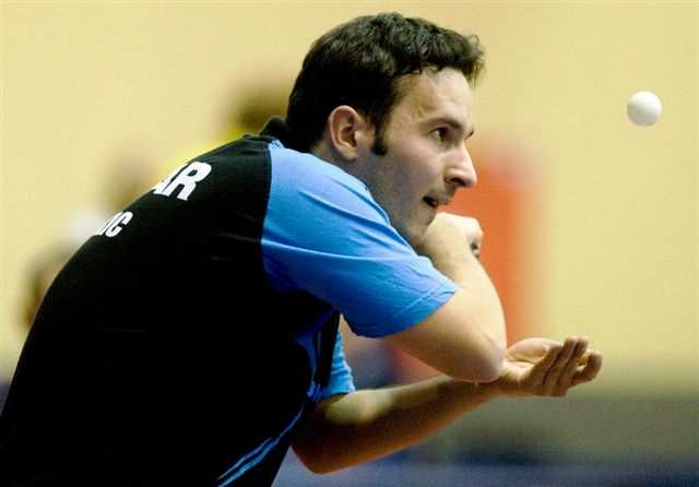 Bojan Tokič